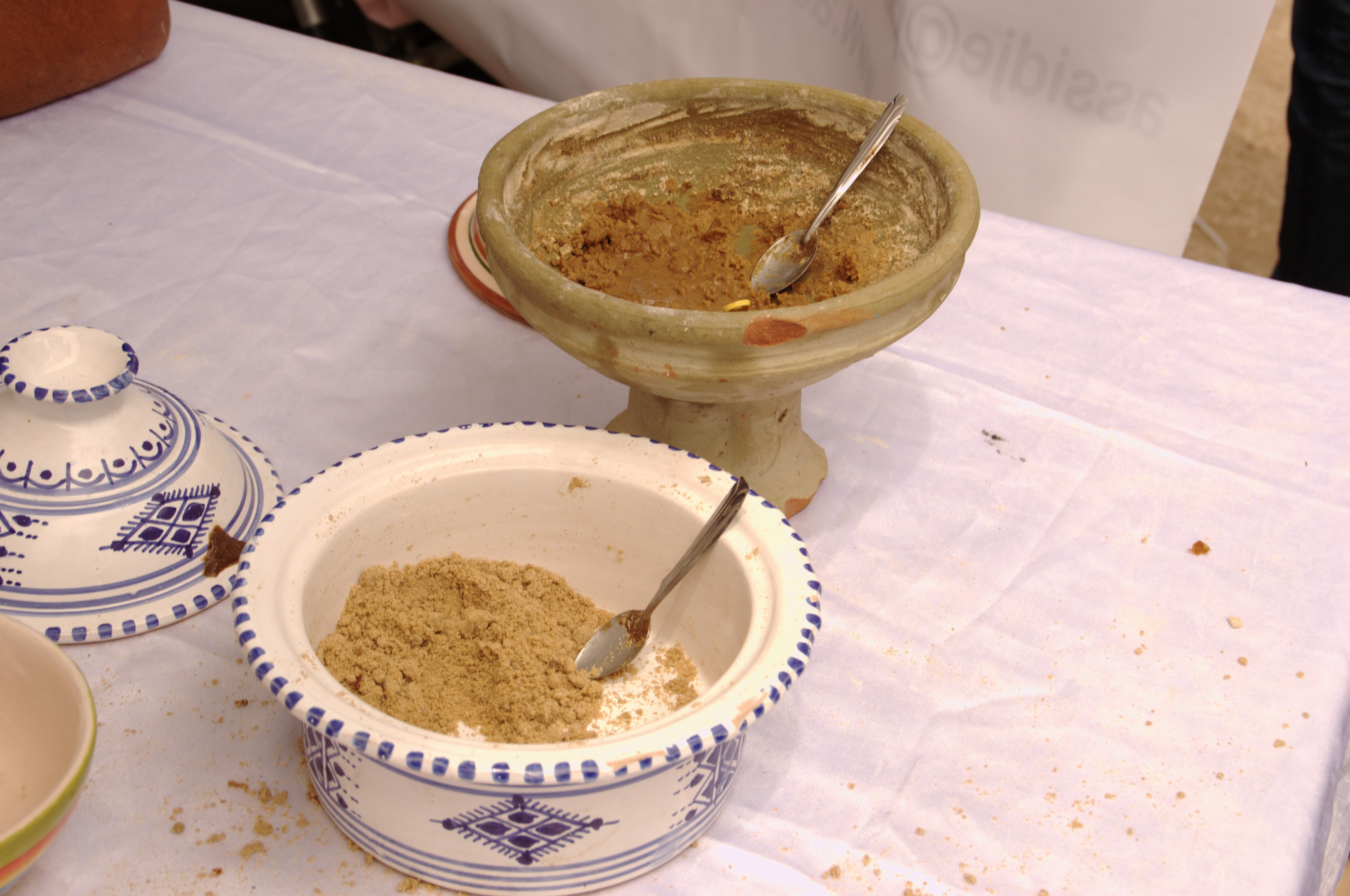 Bsissa de la région de Jerba présentée lors de la foire de la bsissa de Lamta